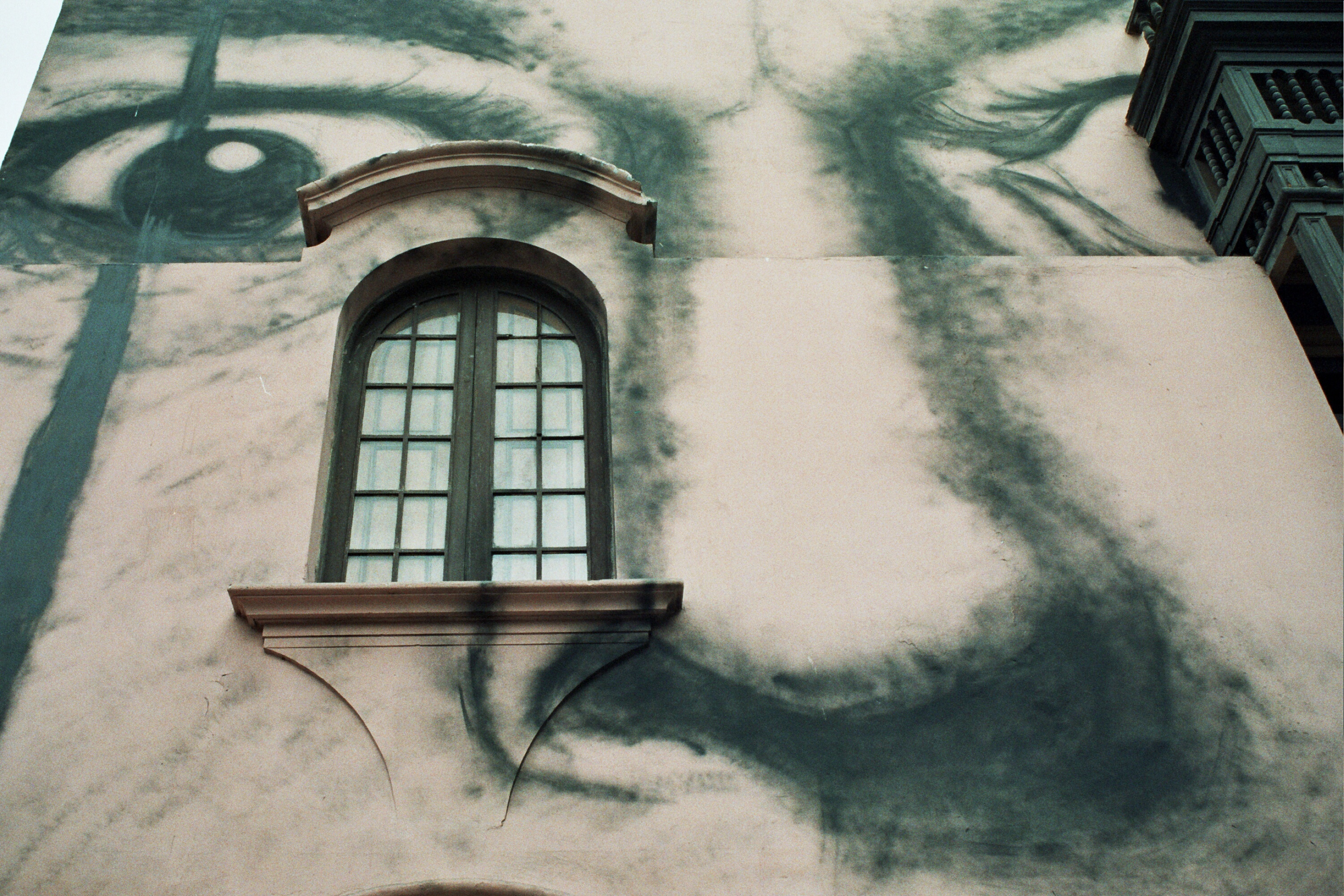 Abbildung Dalís auf einer Häuserwand in Lima (Peru)